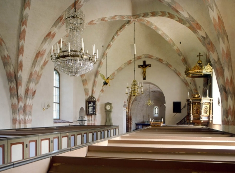 Interiör Eldsberga kyrka i södra Halland